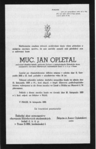 Parte studenta Jana Opletala, který zemřel na následky střelby německých okupantů